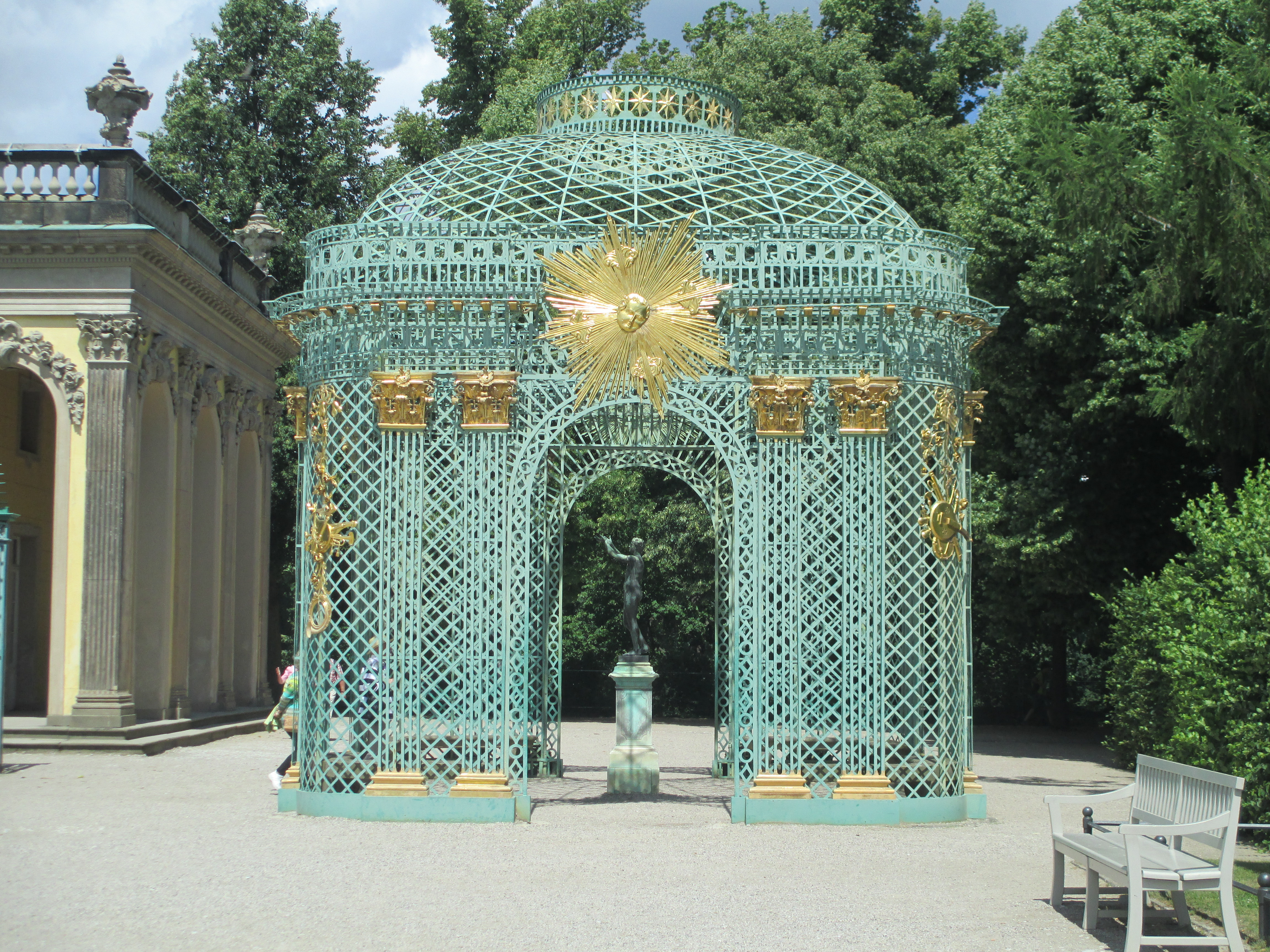 ביתן מקושט ליד הכניסה לארמון סנסוסי